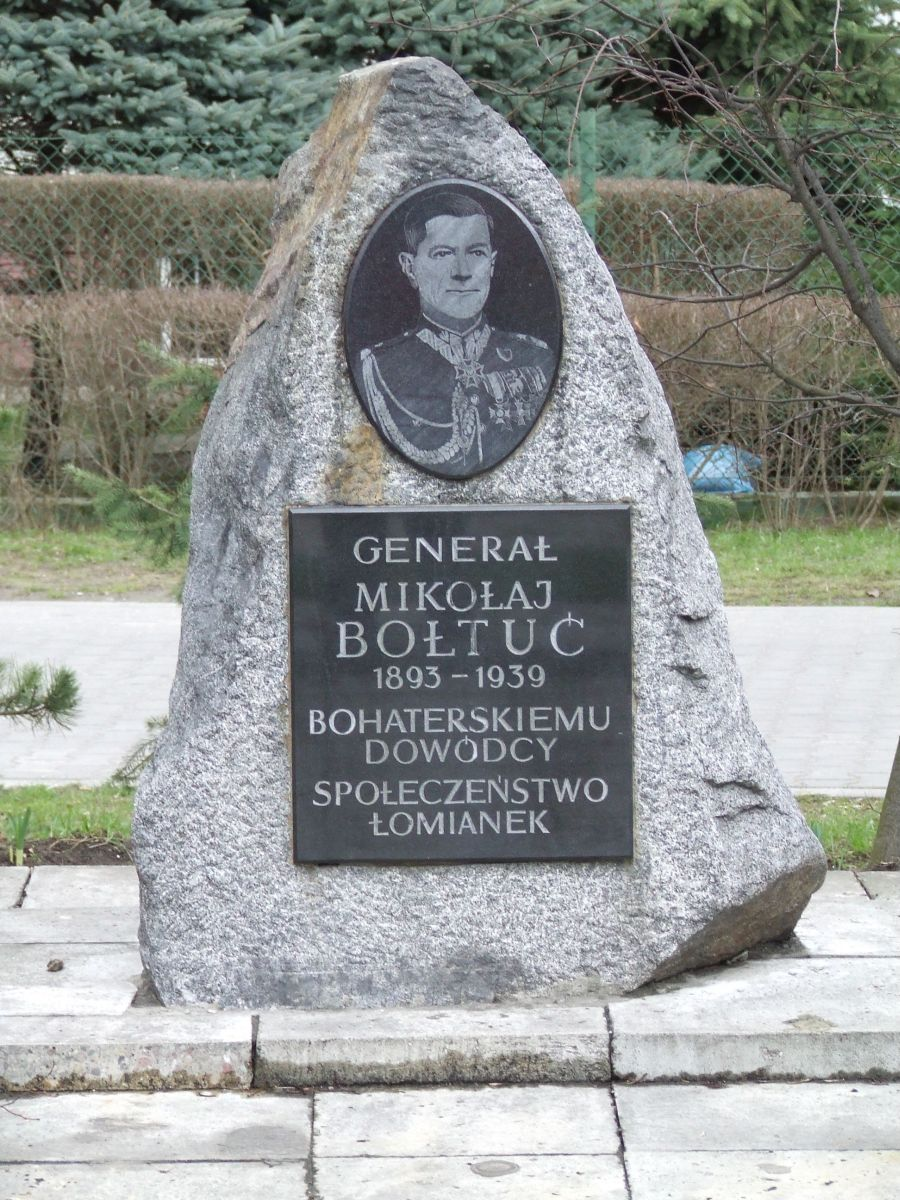 gen. Mikołaj Bołtuć monument in Łomianki, Poland